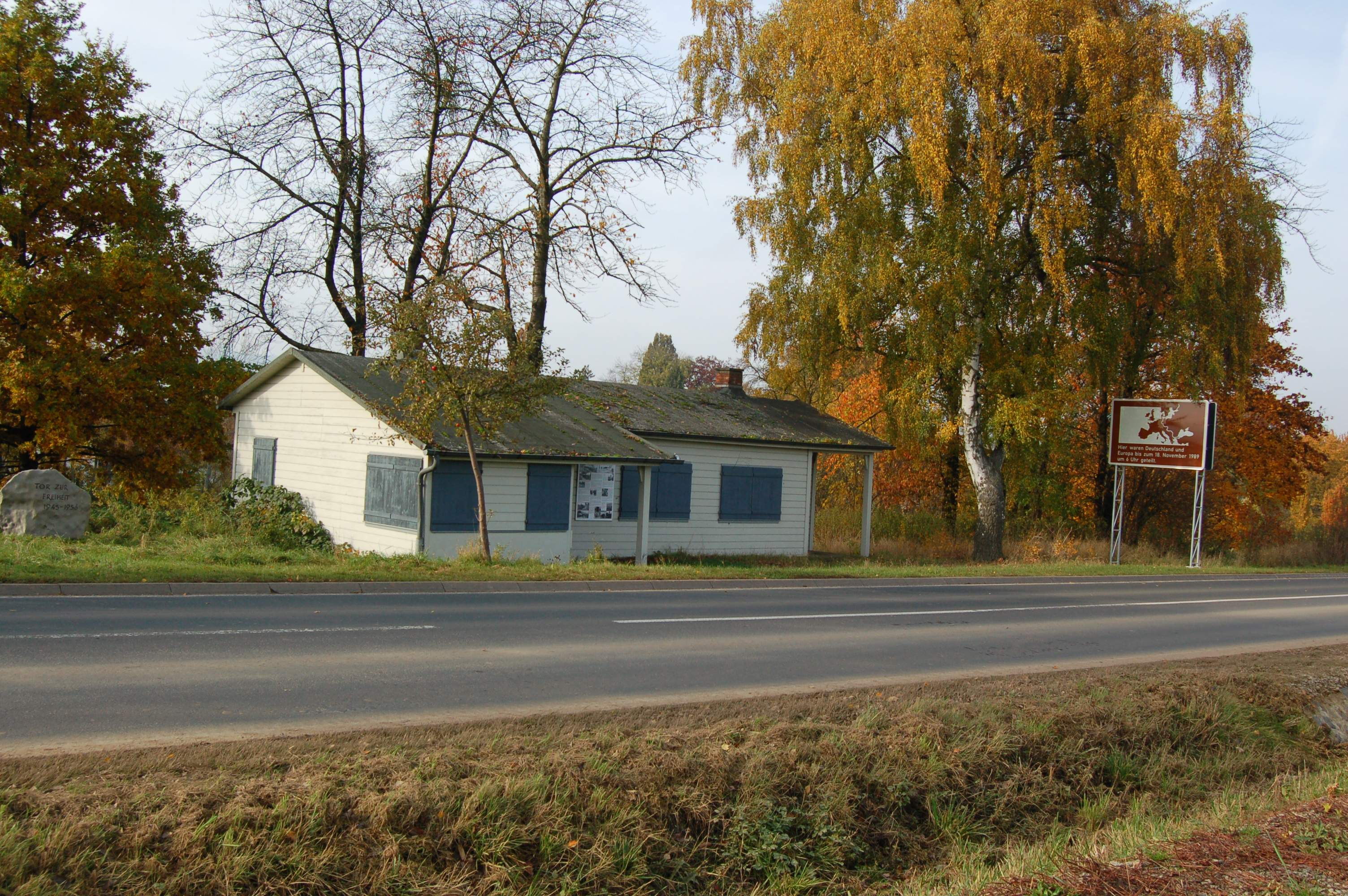 Besenhausen, das ehemalige Grenzhaus an der innerdeutschen Grenze